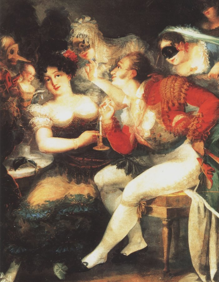 Un cafè al carnaval (1824-1825), de Salvador Mayol (oli sobre tela, 172 x 114 cm), Reial Acadèmia Catalana de Belles Arts de Sant Jordi (inv. gen. 908) En depósito en el MNAC